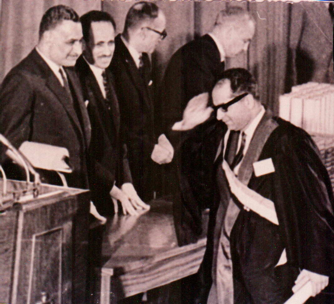 تسلم شهادة الدكتوراه من الرئيس المصري جمال عبد الناصر والرئيس العراقي عبدالرحمن عارف